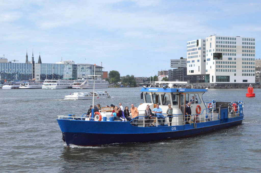 GVB IJveer 35 op het IJ. Foto: Erik Swierstra.